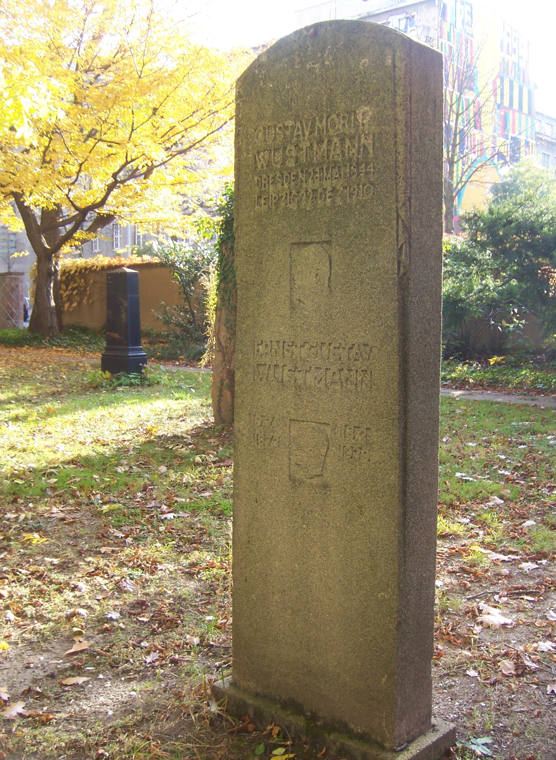 Grabstein Gustav Moritz und Ernst Gustav Wustmann vom Neuen Johannisfriedhof Leipzig. Heutiger Standort: Lapidarium Alter Johannisfriedhof Leipzig.